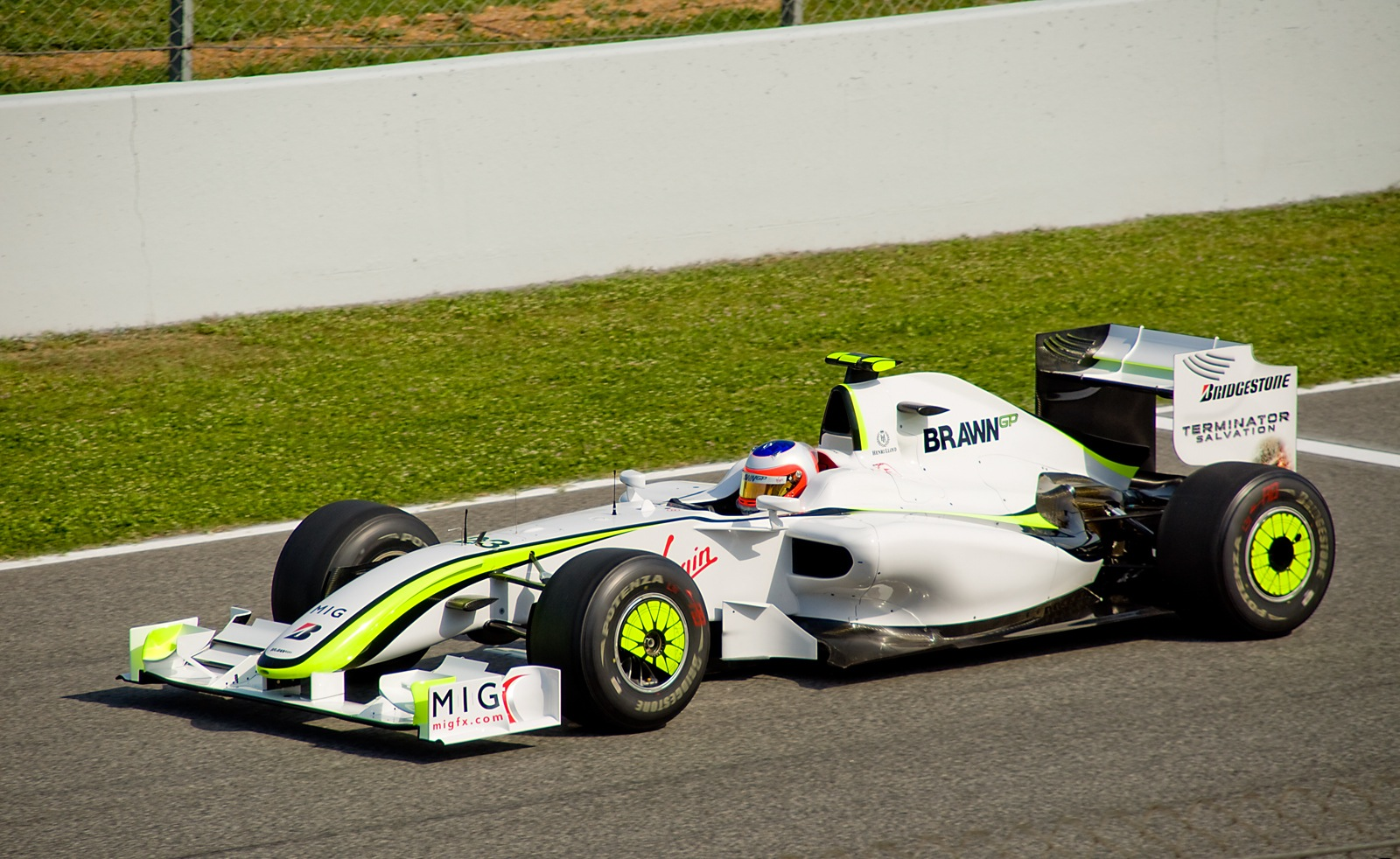 Barrichello Spain 2009 Nikon D90 + Sigma 18-200 DC OS HSM 1/800s - F/9 - 200mm - ISO200